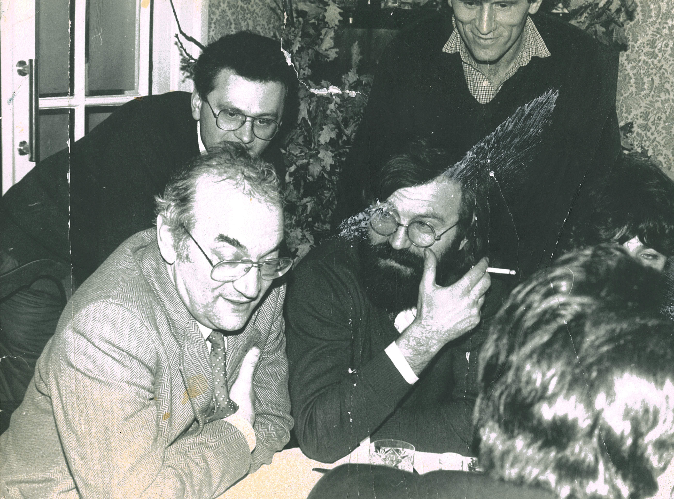 Са Виктором Карчнојем